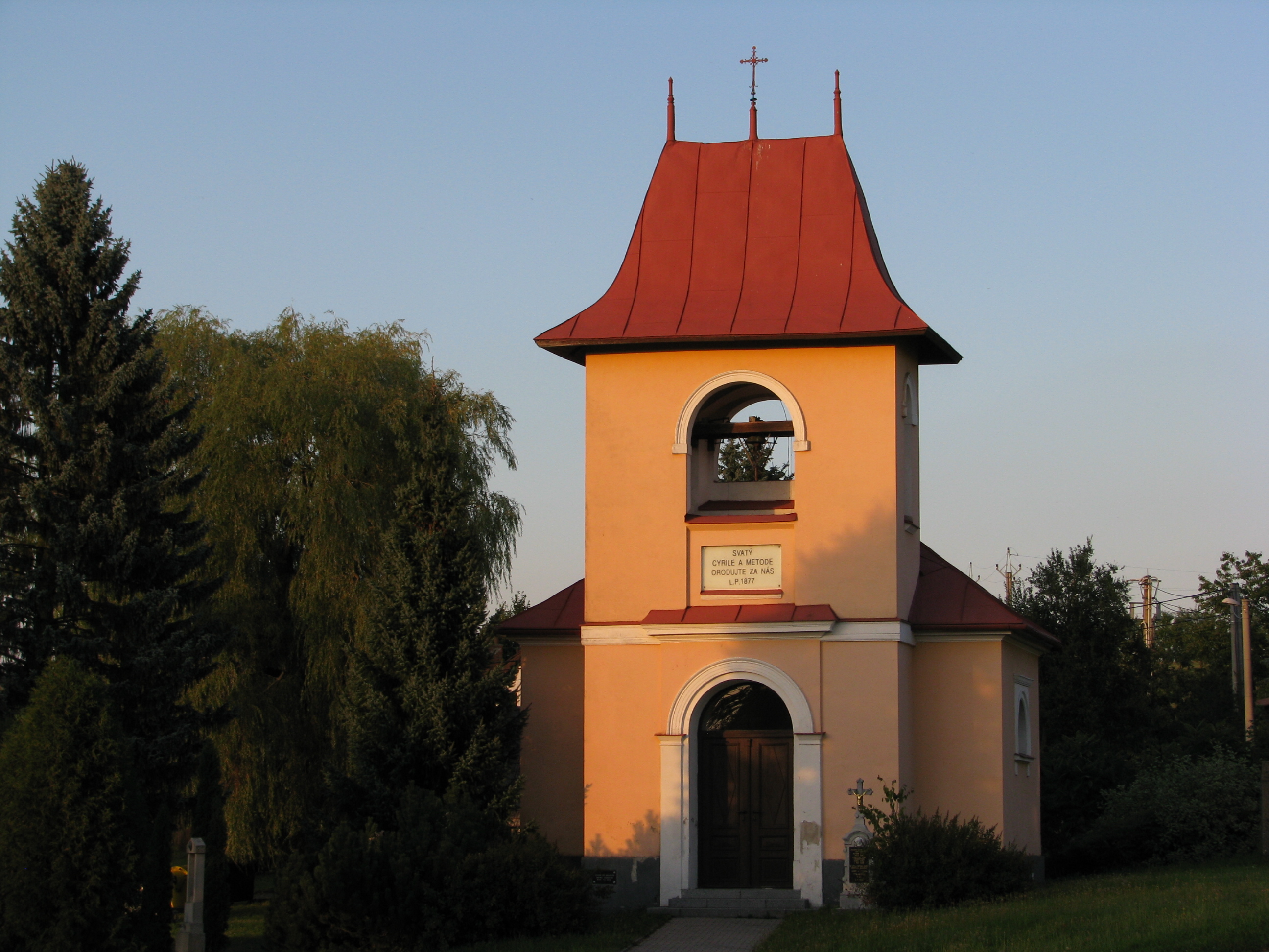 Kaple sv. Cyrila a Metoděje (Hodíškov)